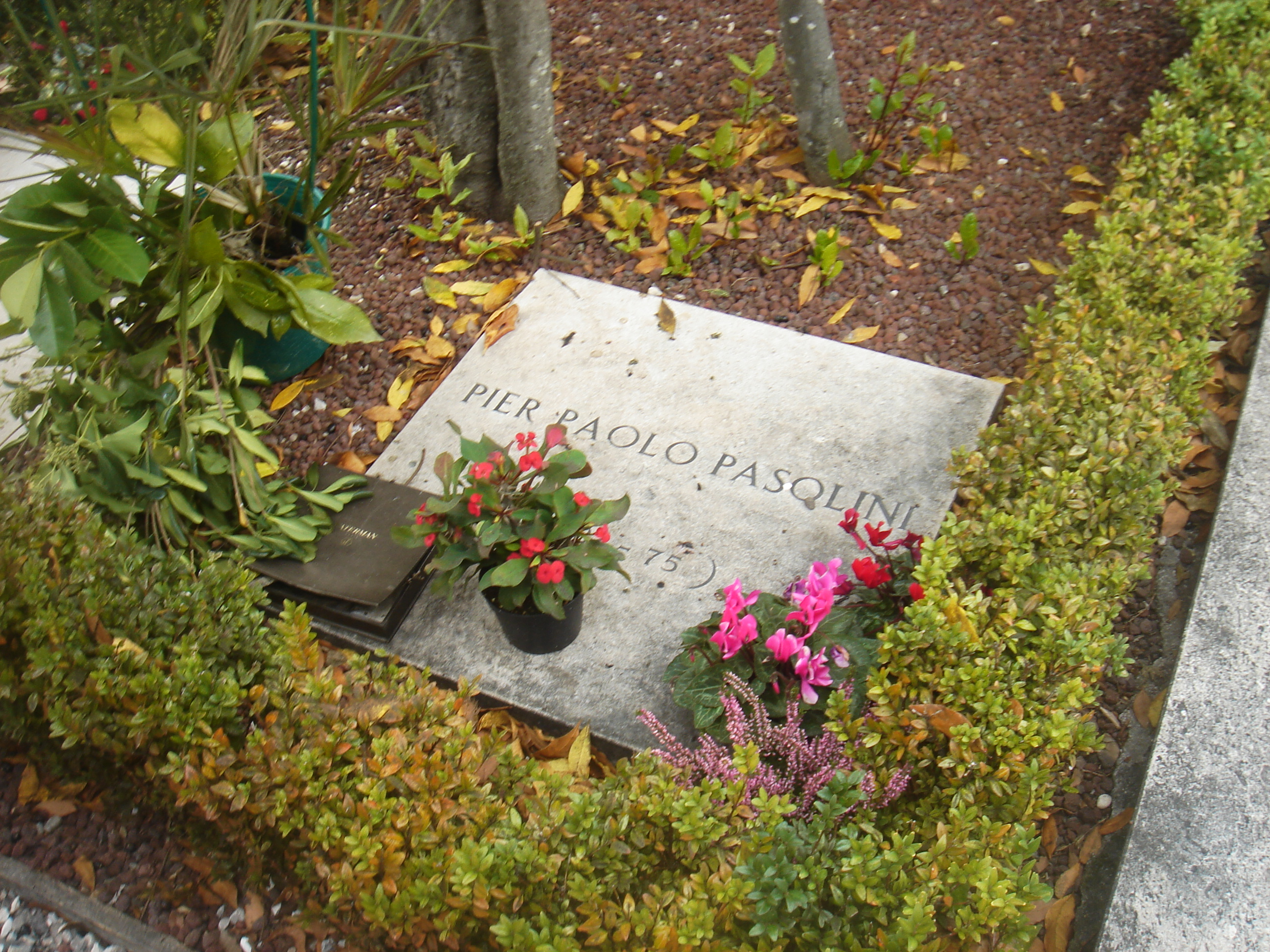 La tomba di Pier Paolo Pasolini, nel cimitero di Casarsa della Delizia, paese di sua madre (vicino alla quale è sepolto) e nel quale il poeta passò i momenti più significativi dell'infanzia.